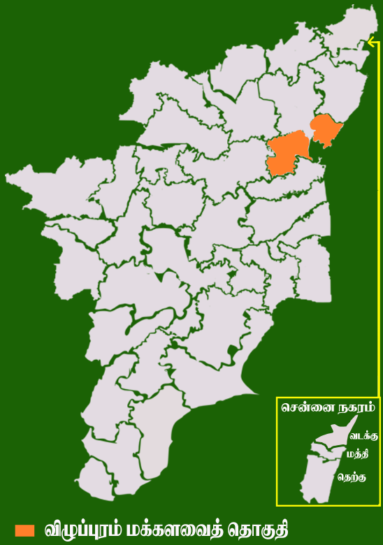 தமிழக வரைபடத்தில் உள்ள விழுப்புரம் மக்களவைத் தொகுதி